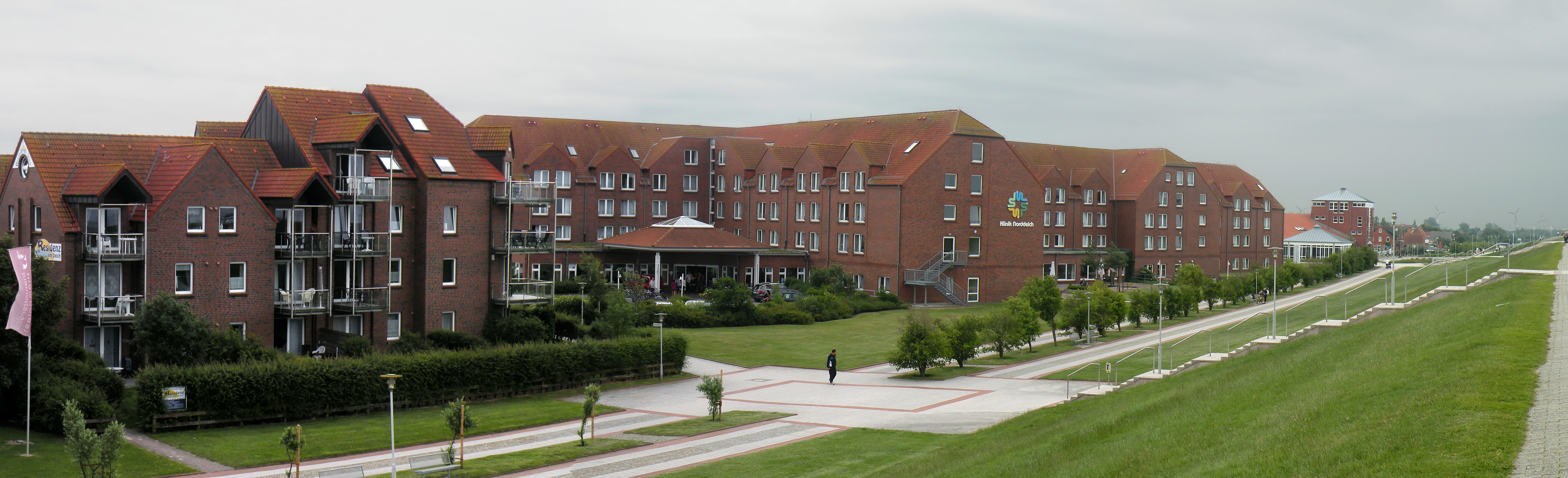 Norddeich.Klinika.(Ostfriesland)